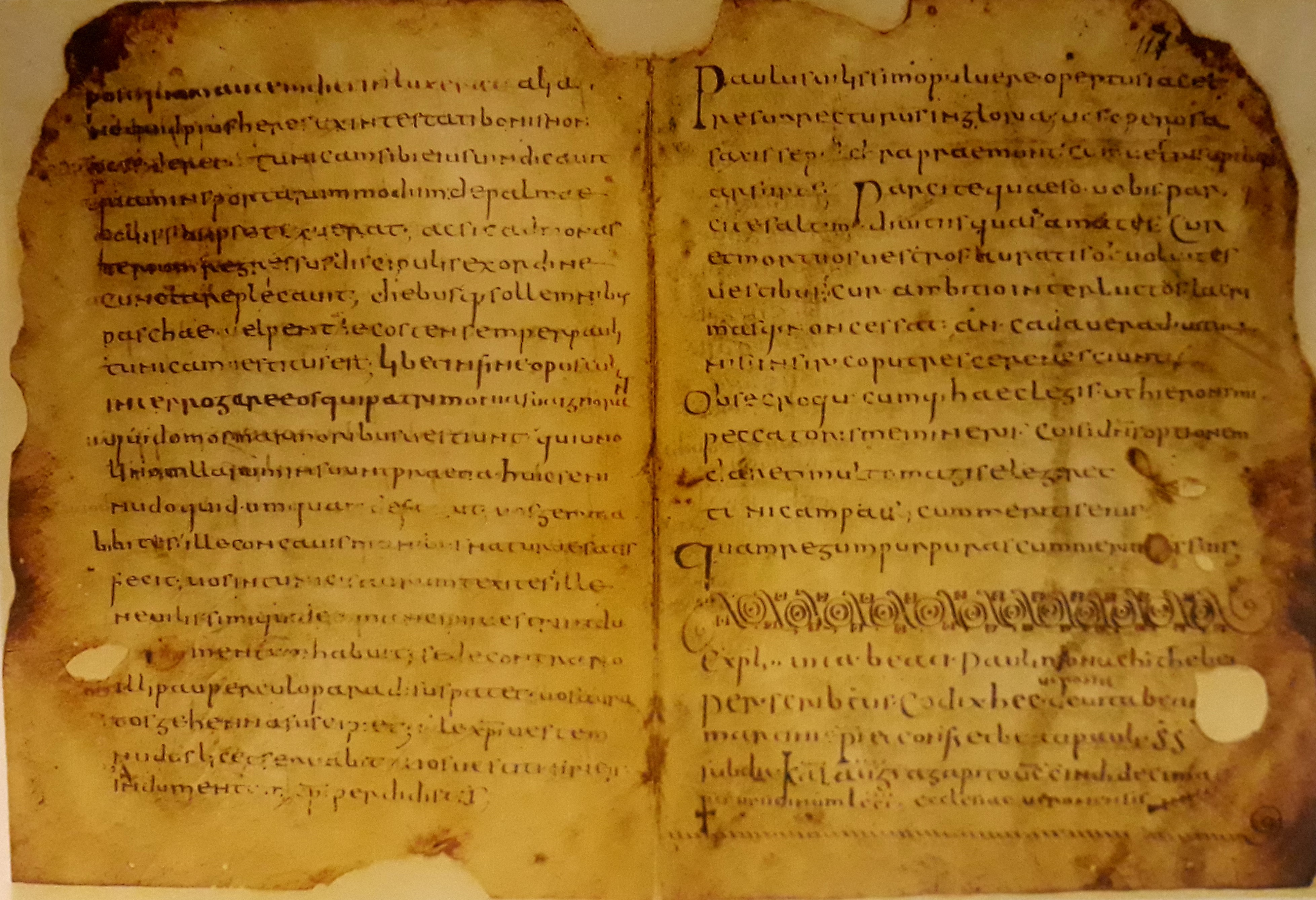 Pagina del Codice di Ursicino, conservato nella biblioteca capitolare di Verona